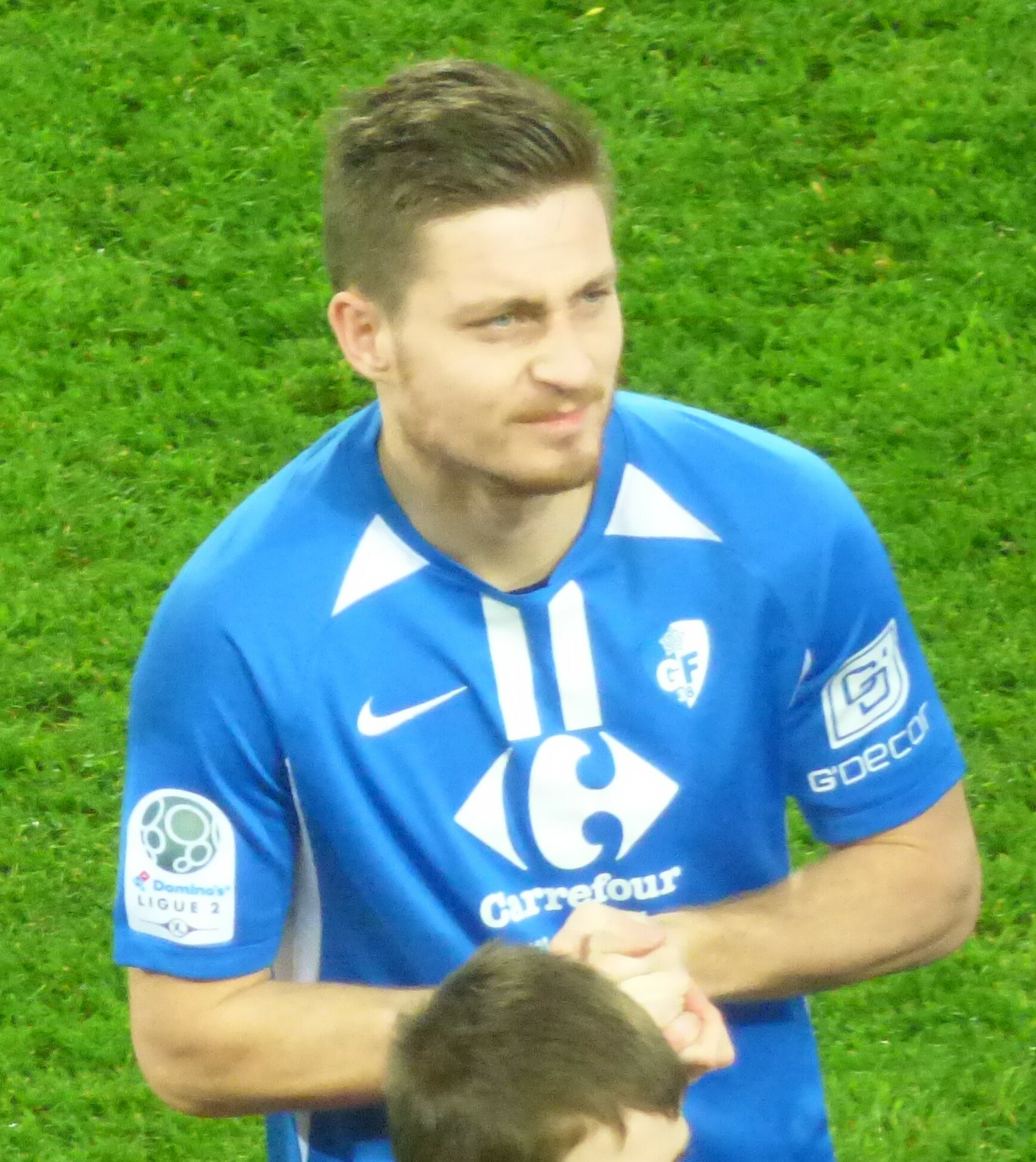 Éric Vandenabeele lors du match RC Lens / Grenoble Foot 38, le 10 février 2020, comptant pour la vingt-quatrième journée du championnat de France de football de Ligue 2 2019-2020, au Stade Bollaert-Delelis.